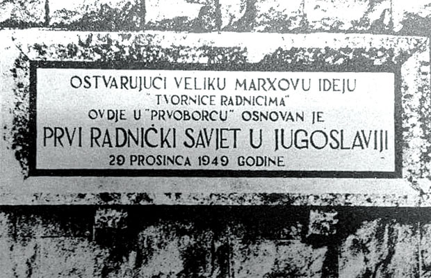 Srpskohrvatski / српскохрватски: Prvi radnički savjet 1949